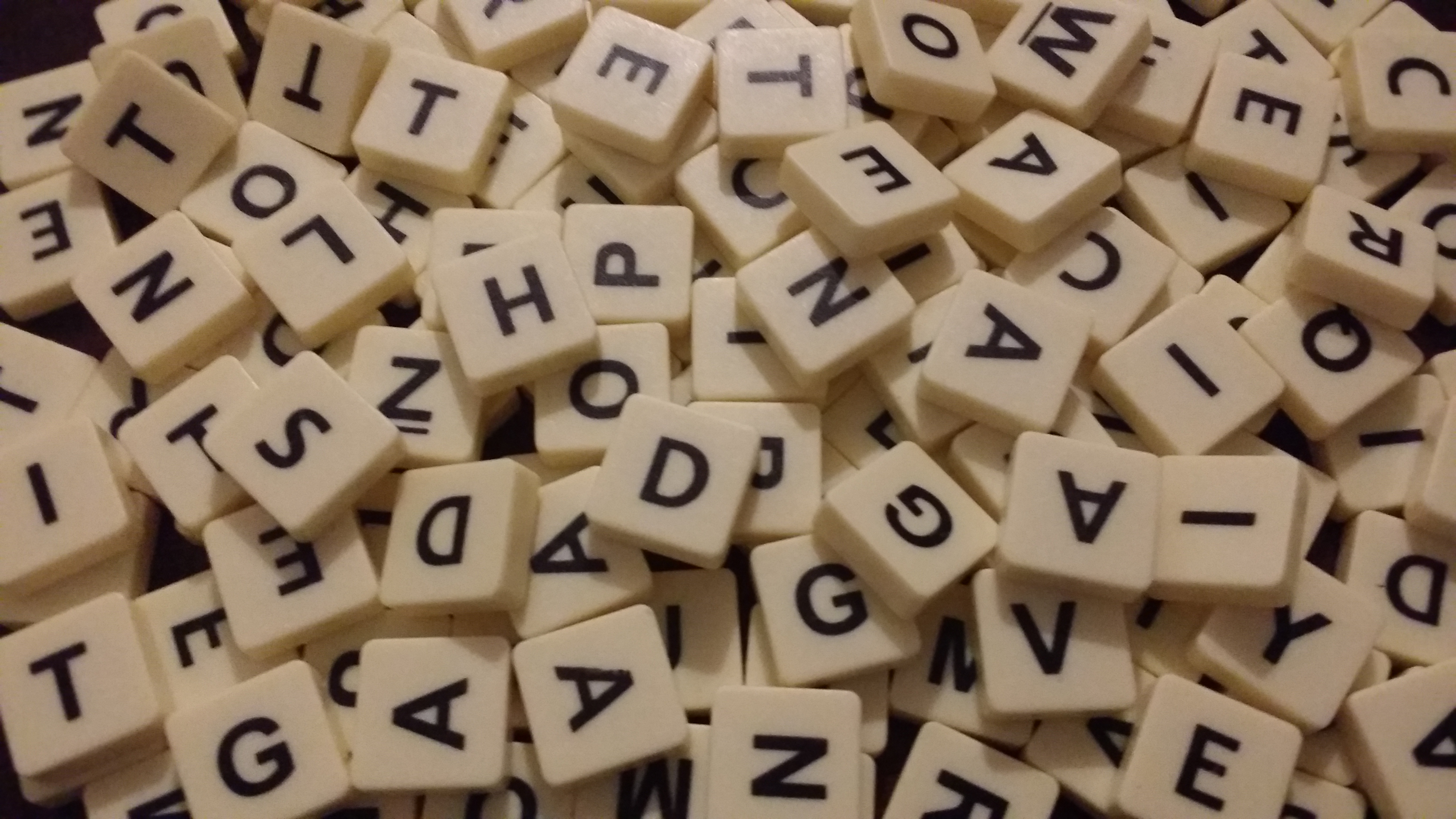 Imagen en la que se visualiza un conjunto de fichas de plástico con letras que son utilizadas en juego de palabras cruzadas